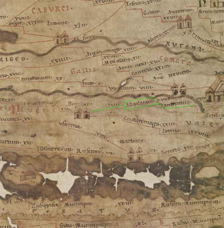 Adsilanum sur la table de peutinger extrait de la table de peutinger qui est libre de droit et surlignage de ma part pour distiguer adsilanum origine: théoriquement libre de droit voir (Peutinger page wikipedia) Catégorie:Cartes Histoire de France